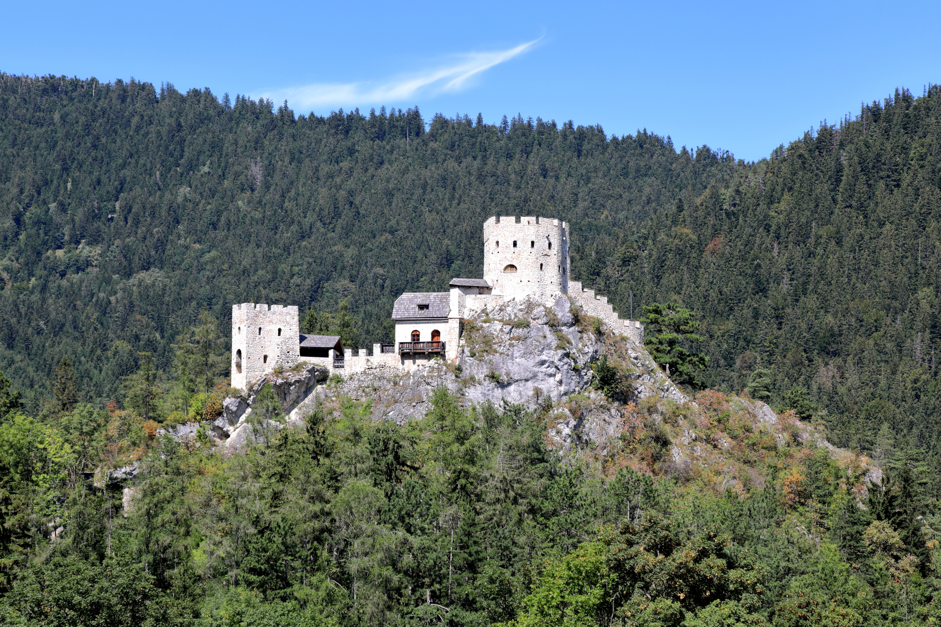 Südostansicht der Burgruine in Losenheim, ein Ortsteil der niederösterreichischen Marktgemeinde Puchberg am Schneeberg.Die Burg wurde im 13. Jahrhundert auf einer kegelförmigen Felskuppe im Westen des Puchberger Talkessels errichtet. Ab der 2. Hälfte des 16. Jahrhunderts wurde die Burg dem Verfall preisgegeben und ab 1996 fand ein „freizügiger“ Wiederauf der nur mehr spärlich vorhandenen Ruine statt.